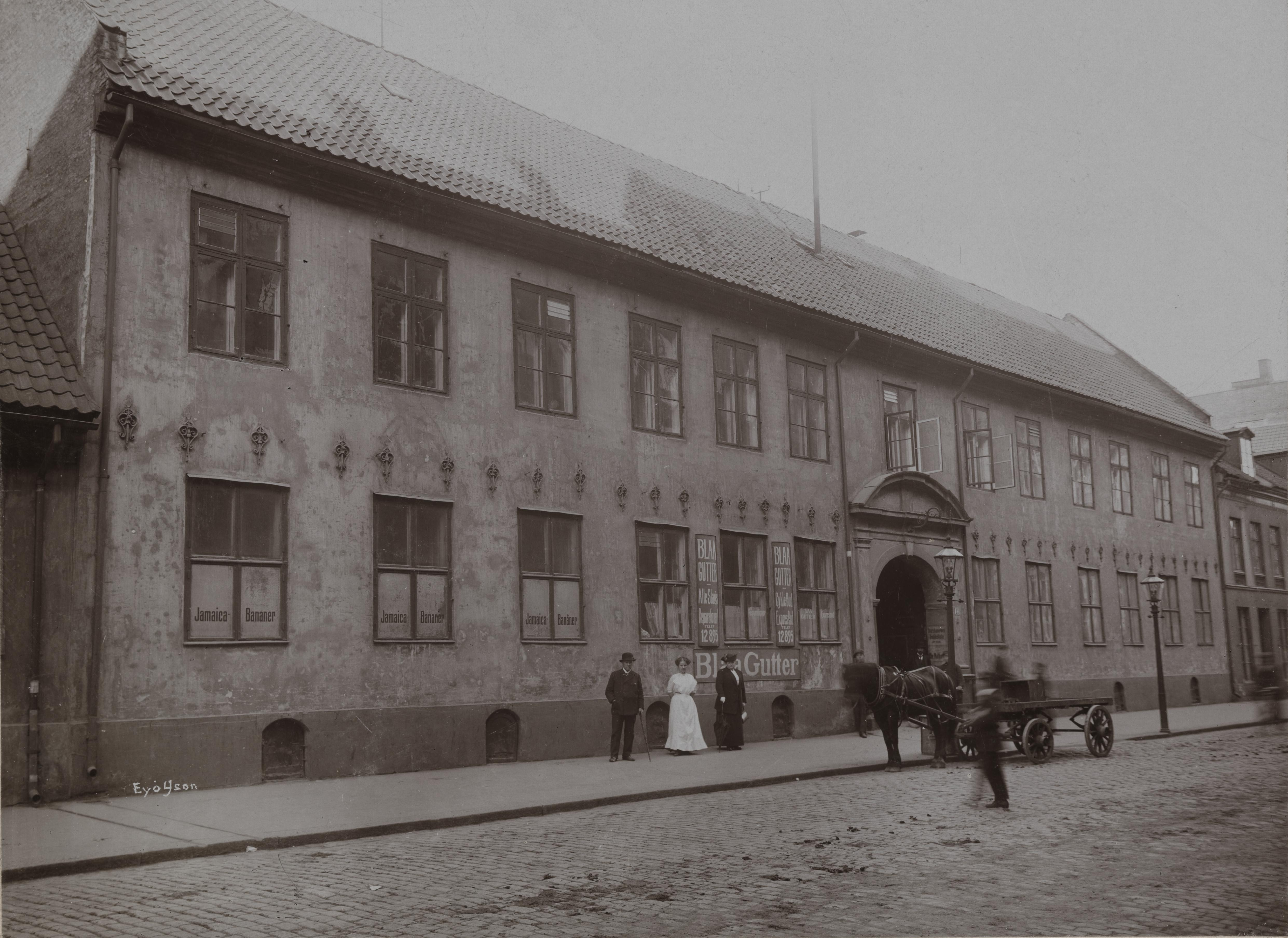 Bildet er hentet fra Nasjonalbibliotekets bildesamling. Anmerkninger til bildet var: Tittel hentet fra bildets baksidetekst..